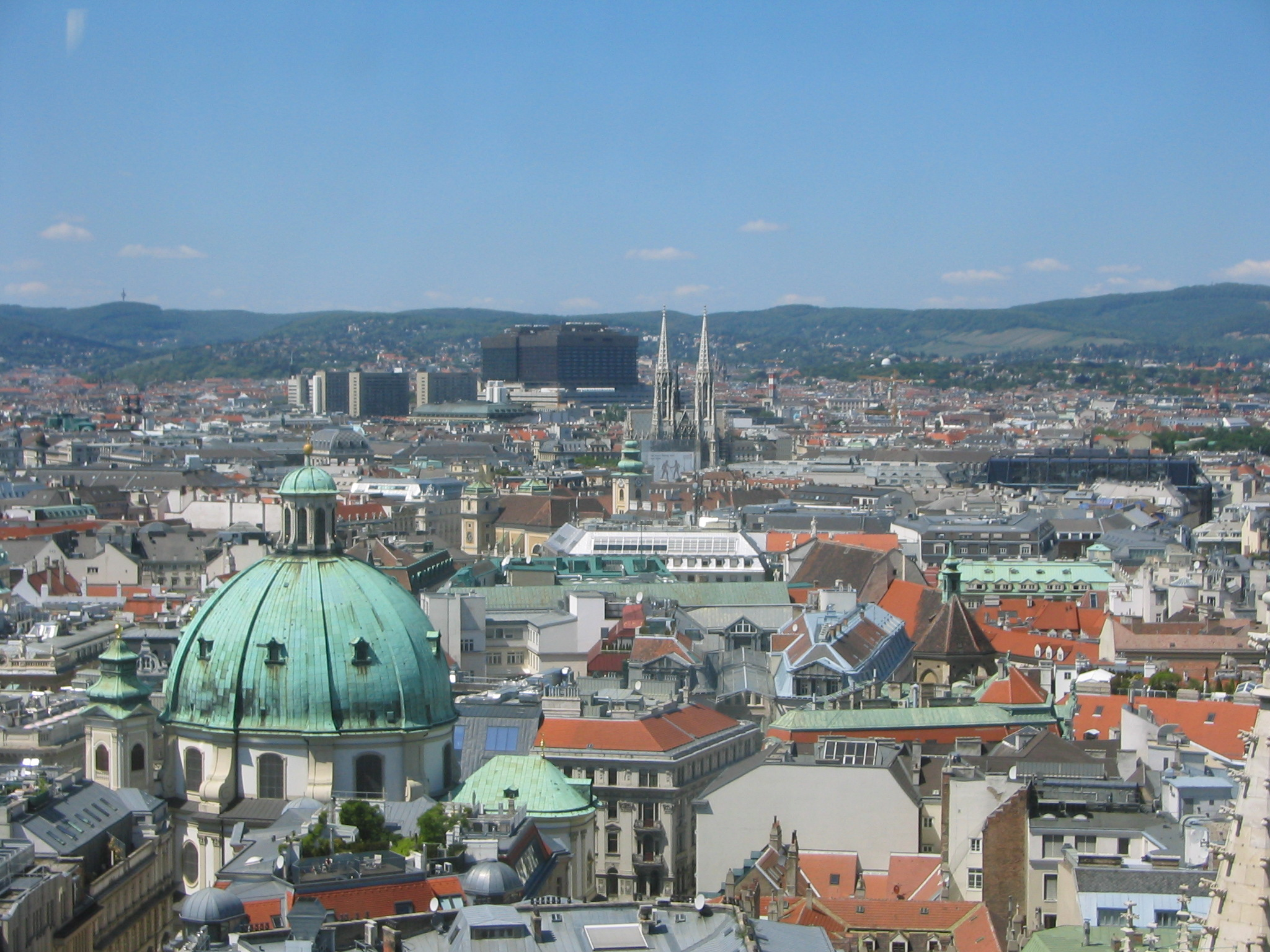 Blick vom Stephansdom auf Wien Richtung Norden, im Zentrum die Votivkirche.